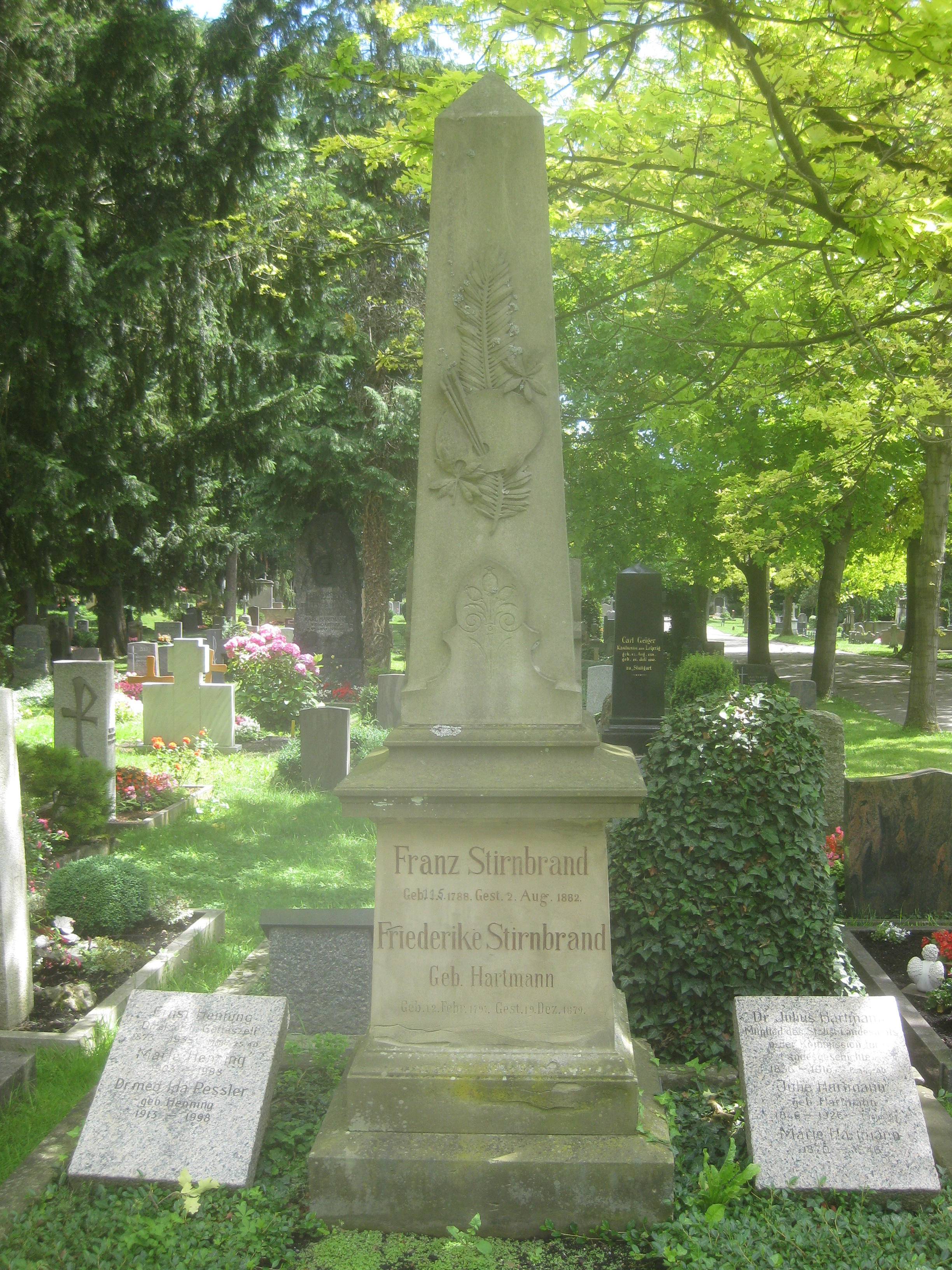 Grab von Franz Seraph Stirnbrand, Stuttgart, Pragfriedhof, Abteilung 26. (Deutlich erkennbar nachträgliche Hinzufügung der Ziffern 11 und 5 vor Geburtsjahr (Stirnbrand war ein Findelkind).